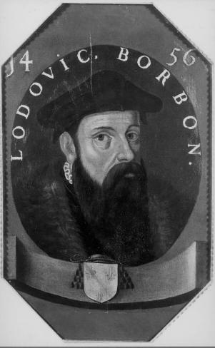 Louis de Bourbon, Princebishop of Liège